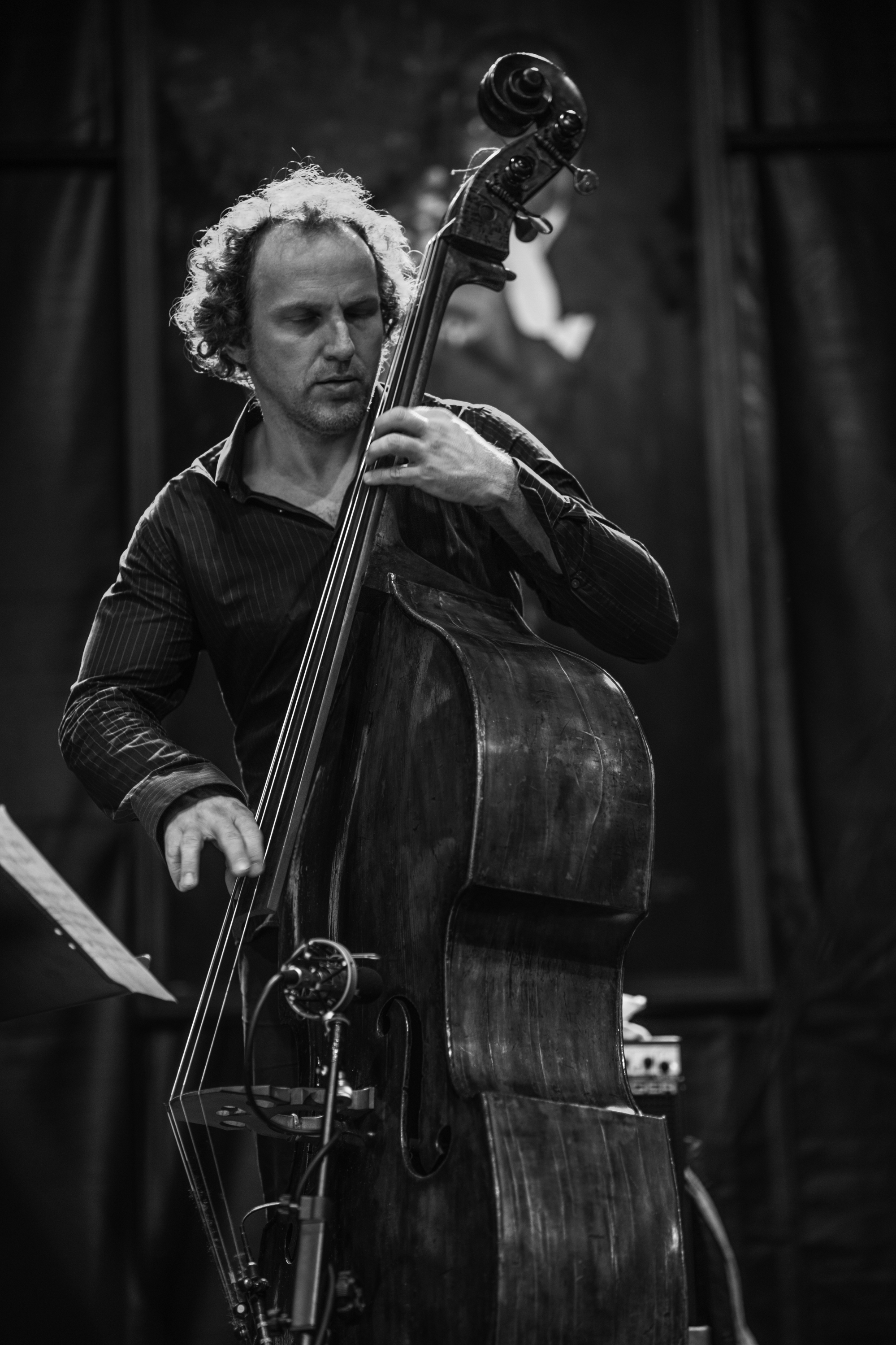 Hans Glawischnig 19º FESTIVAL INTERNACIONAL DE JAZZ DE PUNTA DEL ESTE FINCA EL SOSIEGO, Maldonado, Uruguay